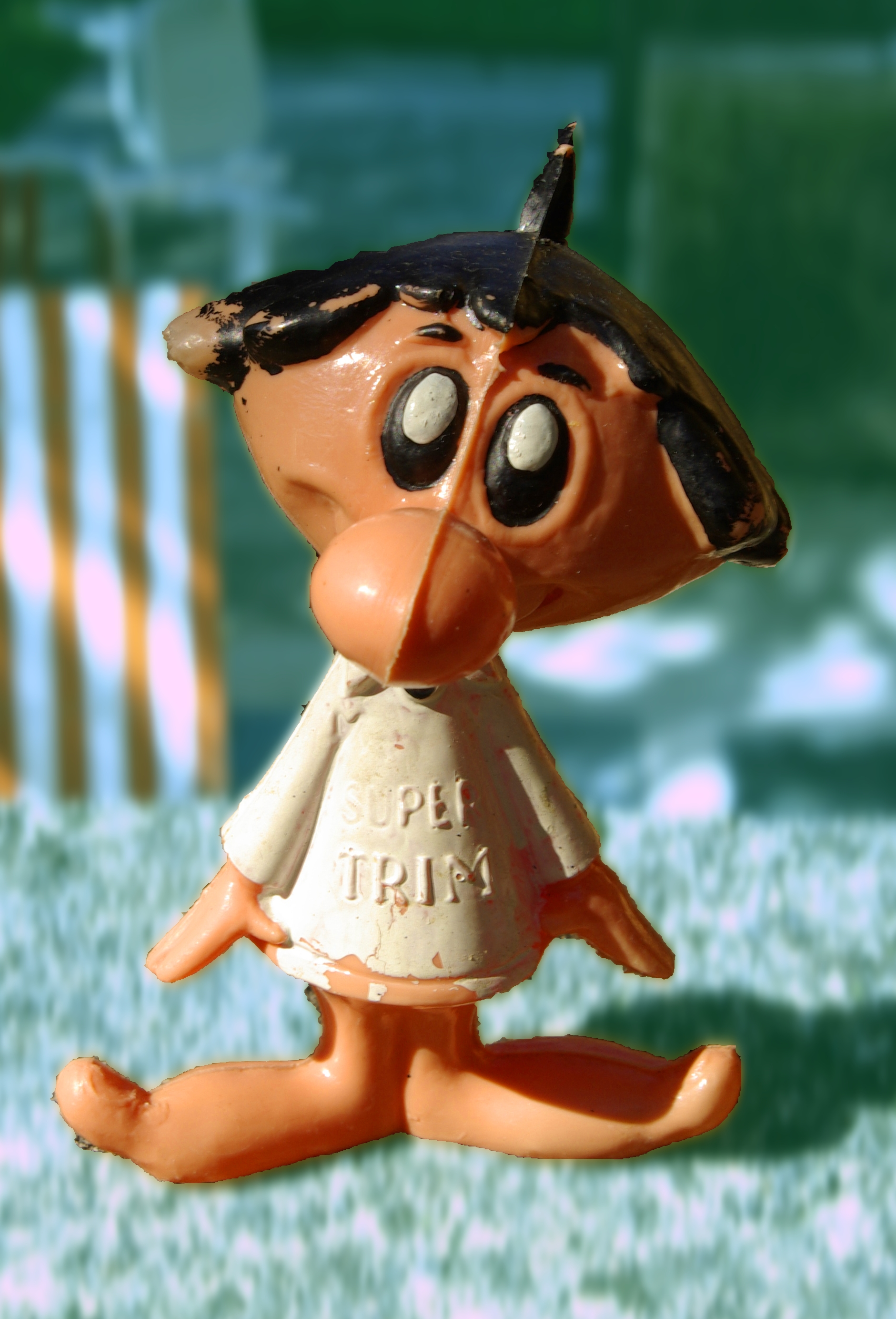 Angelino supetrim personaggio di Carosello anni '60